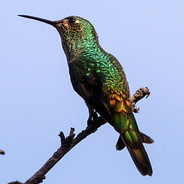 Salta to Uquia, Jujuy